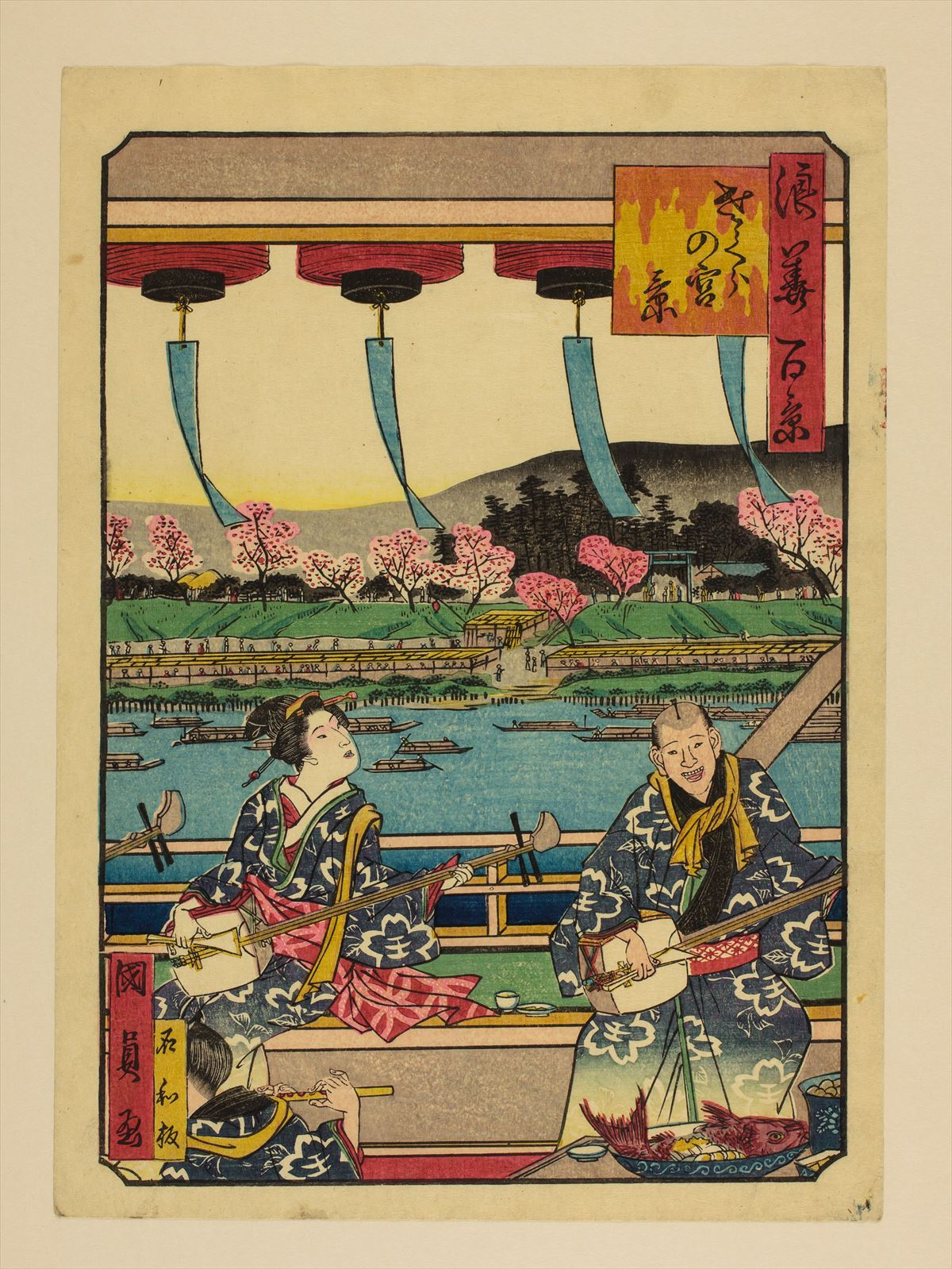 1800年代。歌川國員/画。浪花百景 102枚のうちの1枚。大阪市立中央図書館蔵。